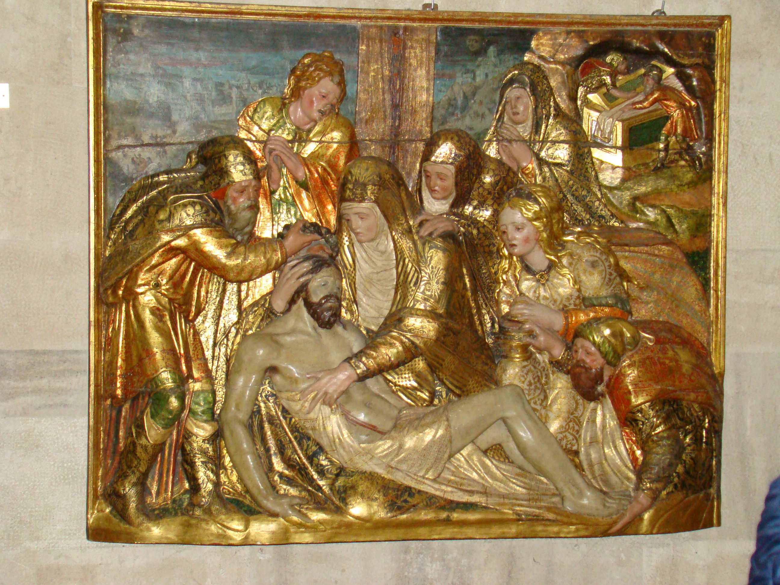 Escultura renacentista "Llanto sobre Cristo muerto" de Isidro de Villoldo. Se encuentra en el museo Catedralicio de la ciudad de Valladolid (España), en la capilla de San Llorente.